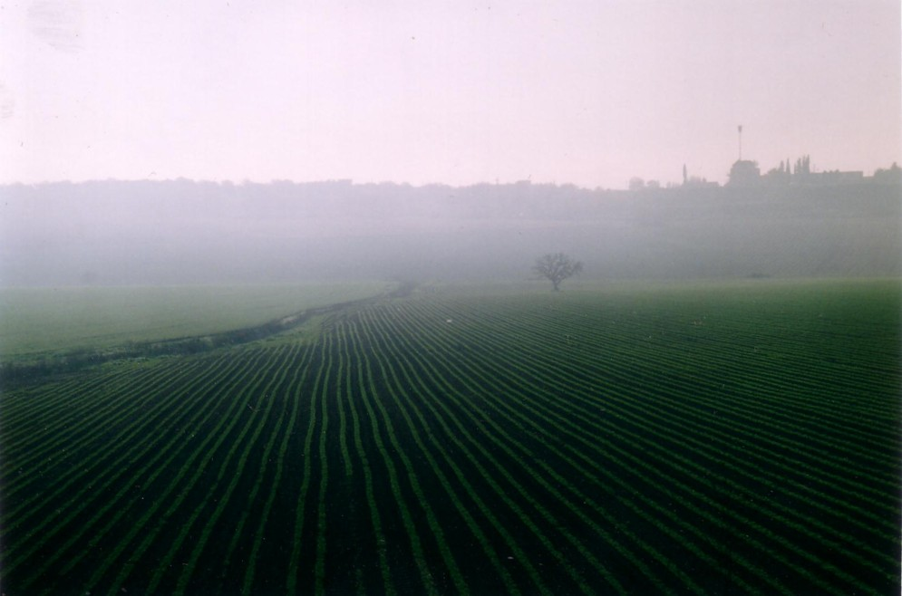 fog in Jezreel Valley